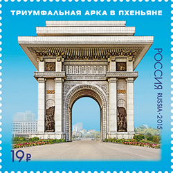 Совместный выпуск Российской Федерации и Корейской Народно-Демократической Республики. 70 лет освобождению Кореи